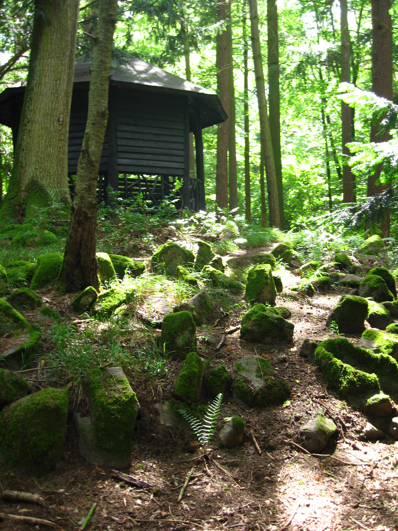 Hütte im Akademischen Forstgarten Gießen